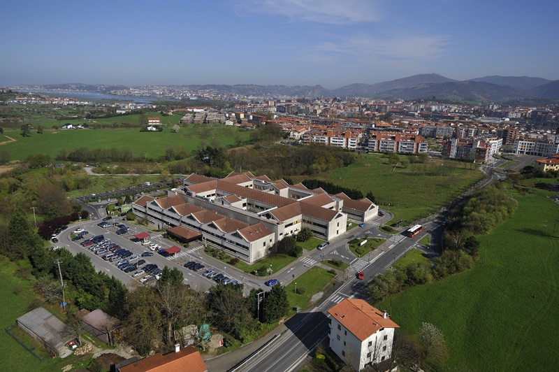 Hospital del Bidasoa, vista aérea.